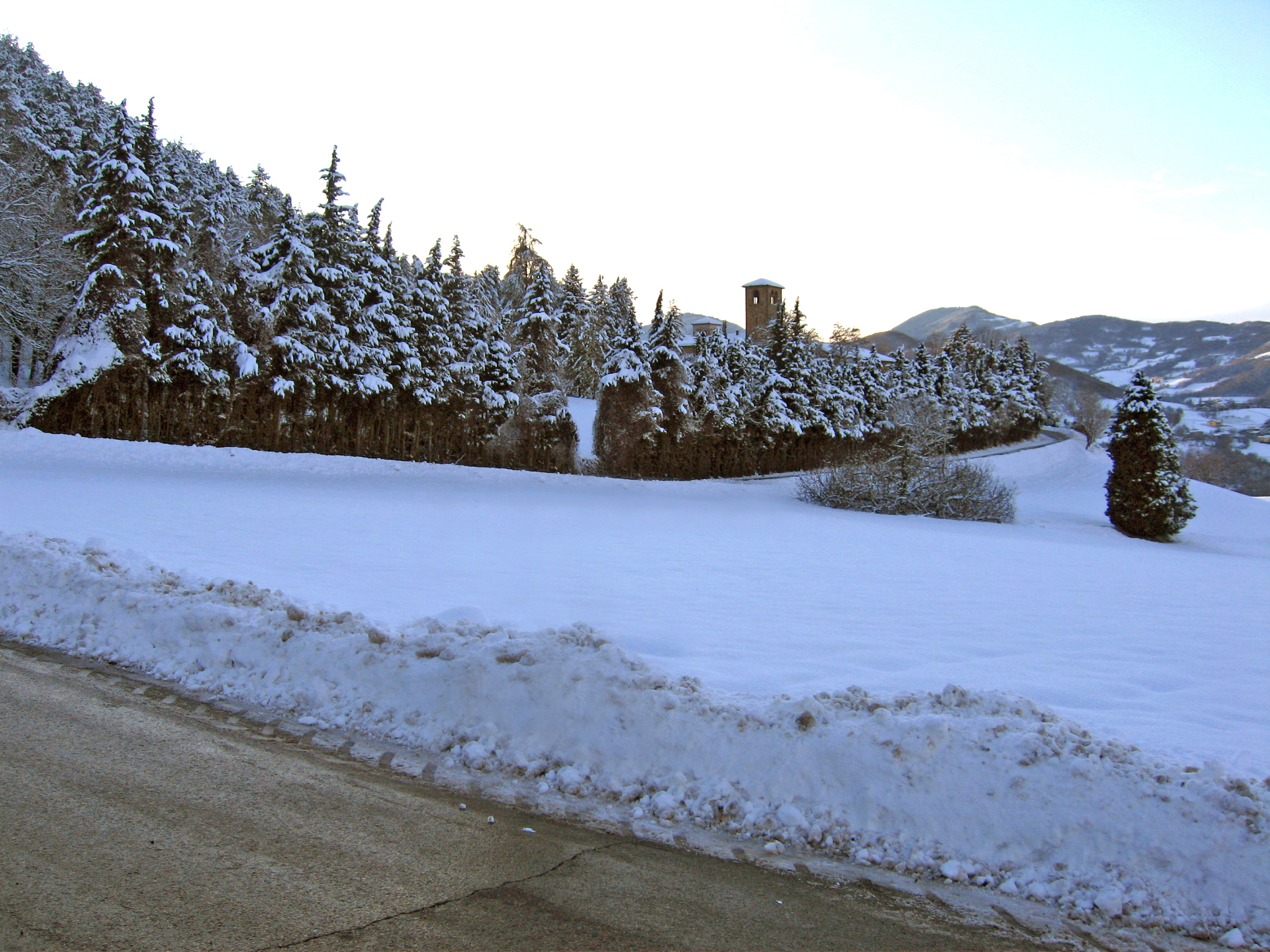 Abbazia di San Basilide innevata